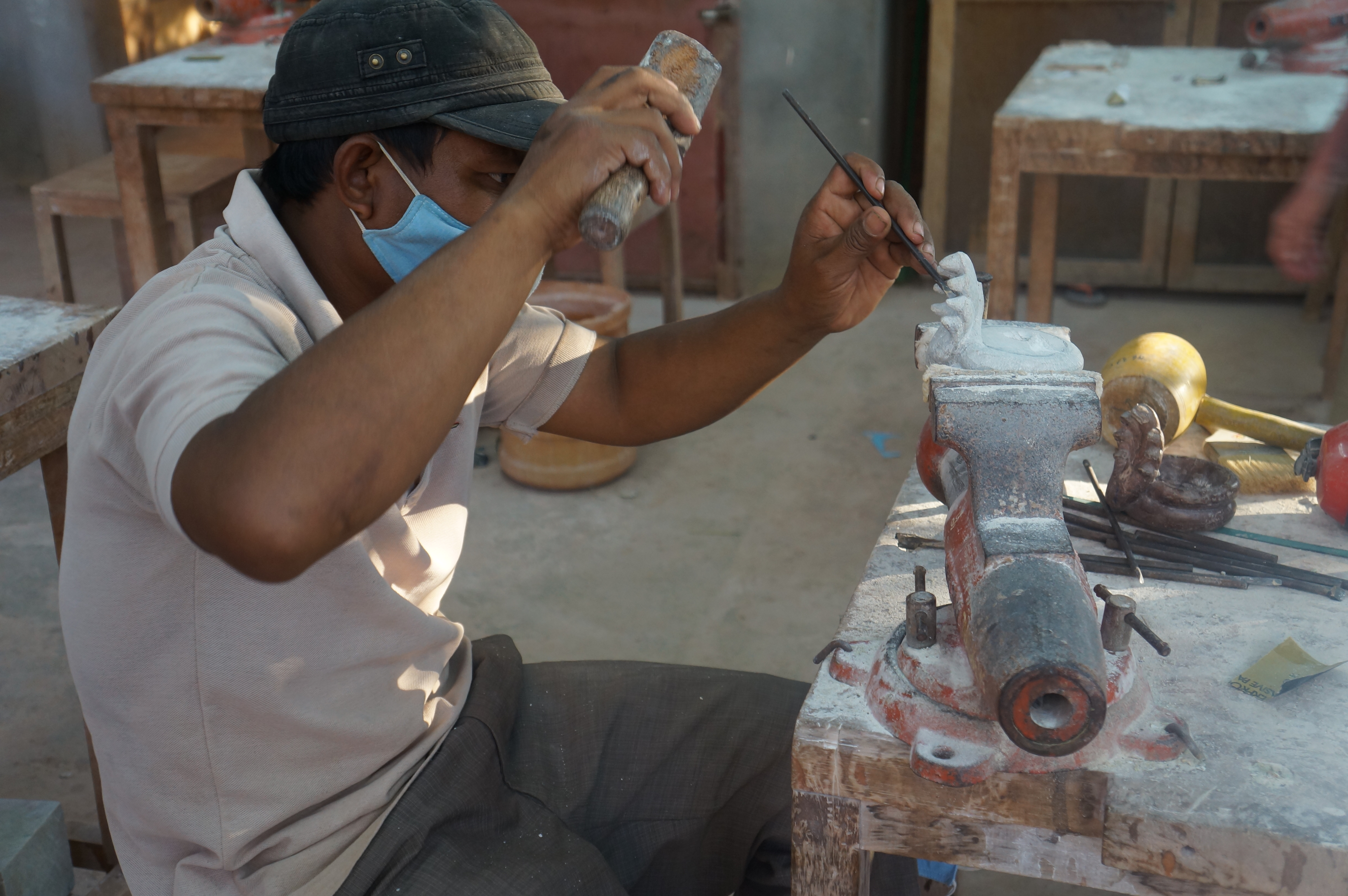 Sculpteur du centre d'Artisans d'Angkor à Stung Thmey Street